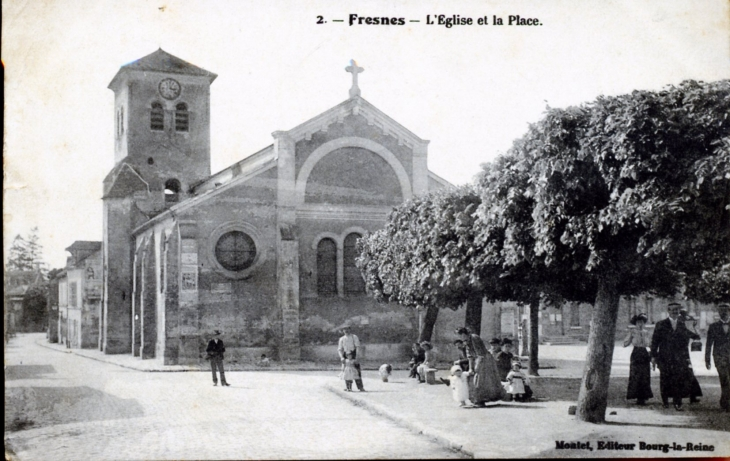 Fresnes.Place de l'église